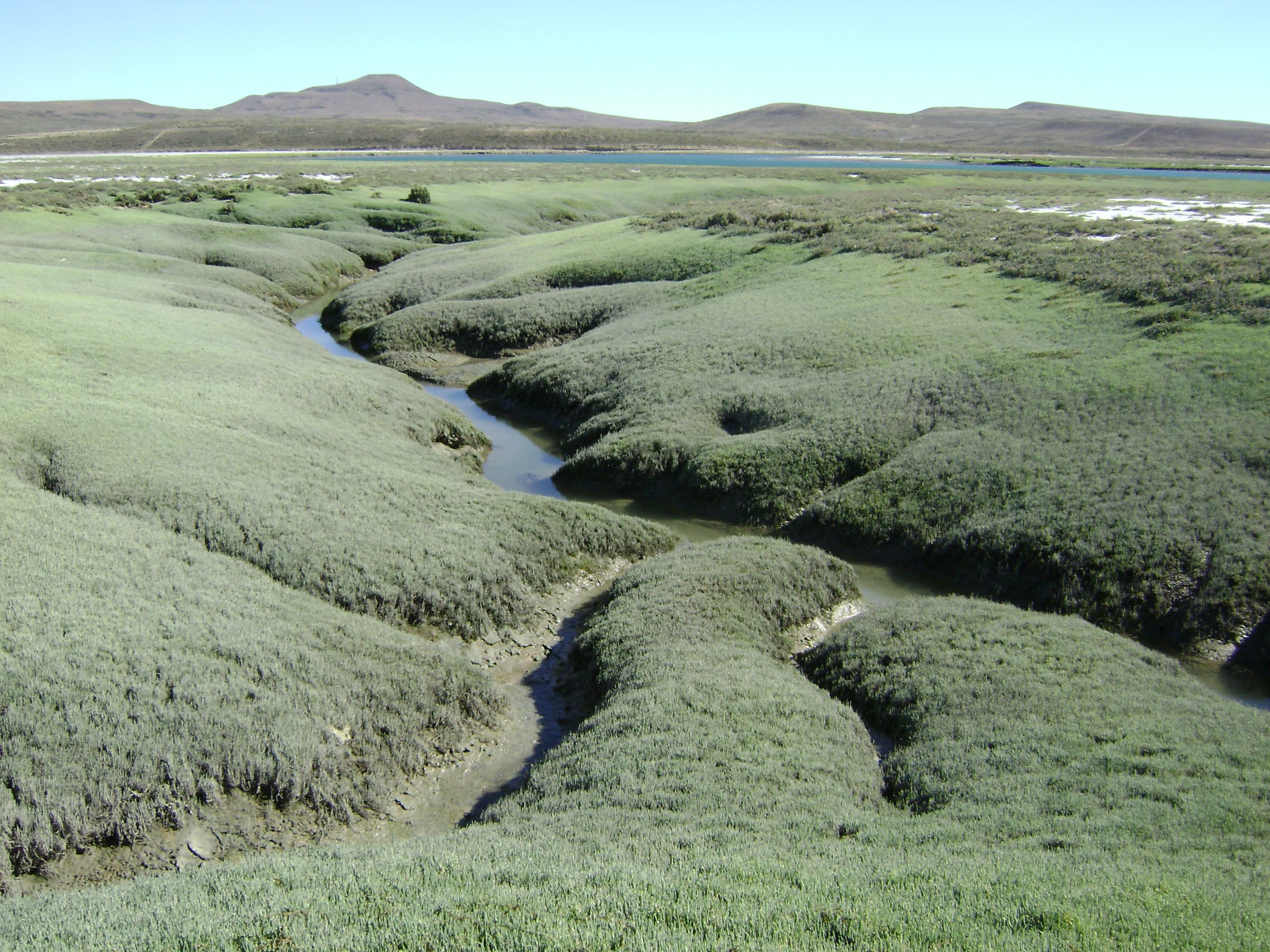 Bahía de San Julián. En bajamar. Se observan algas bajas y al fondo una extensa cubierta salitrosa. Al fondo y el más alto, el cerro de Monte Cristo. Puerto de San Julián. Santa Cruz. Argentina.